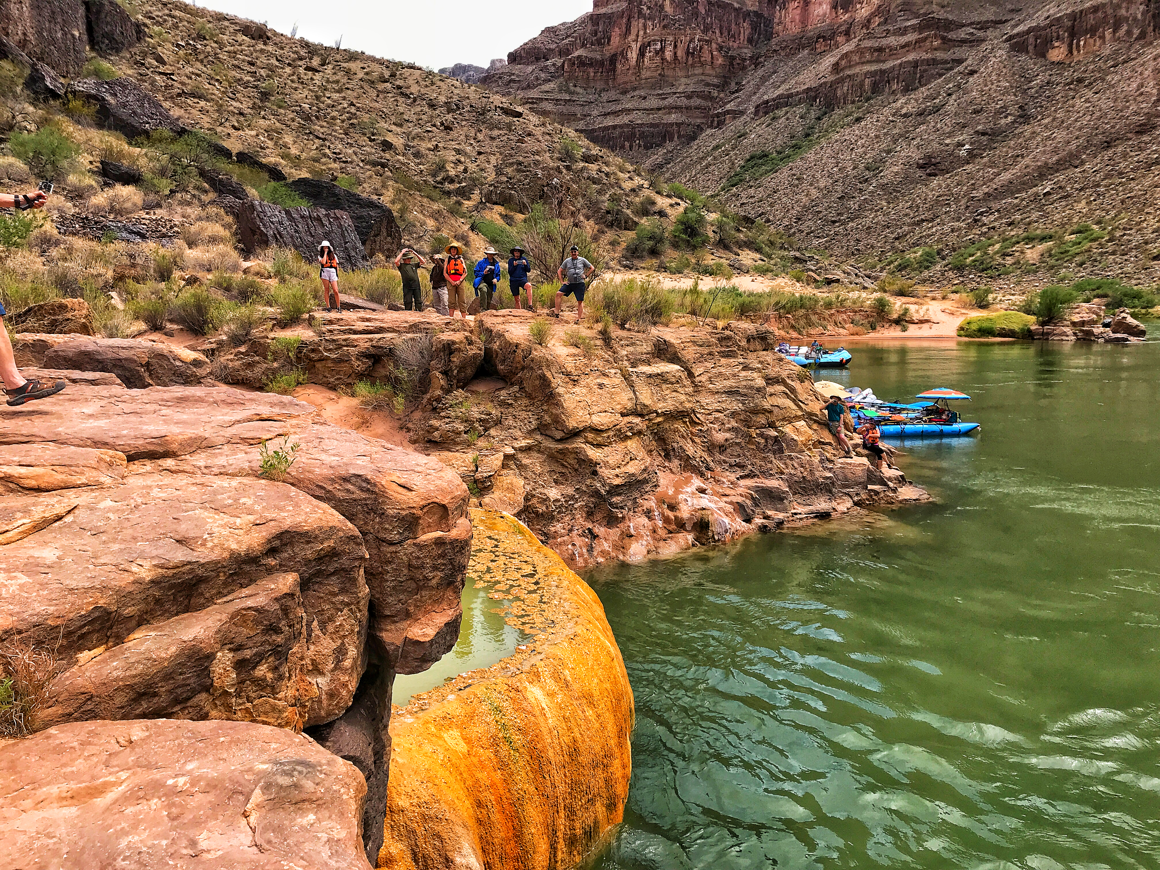 Pumpkin Hot Spring, Grand Canyon